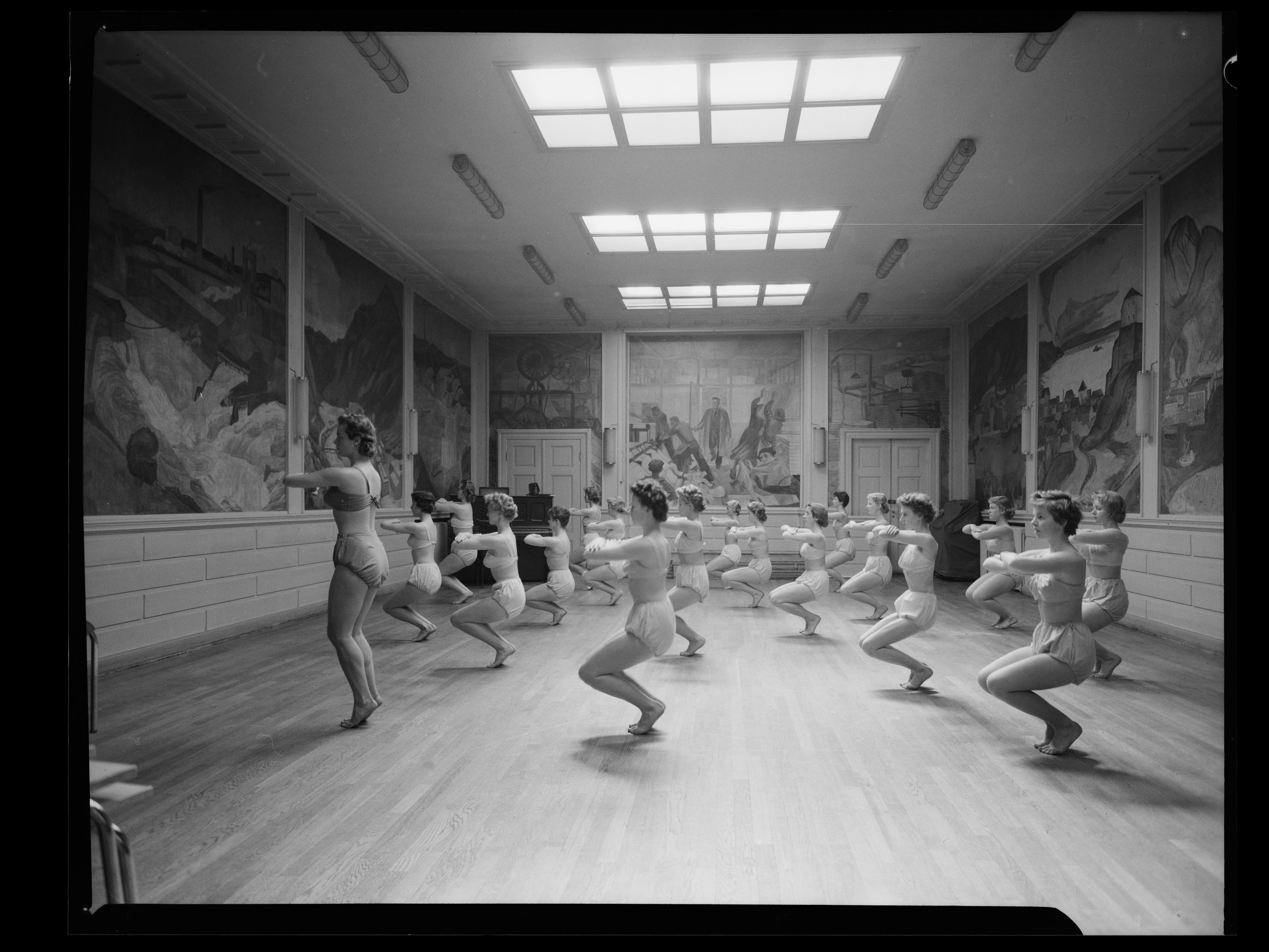 Bildet er hentet fra Nasjonalbibliotekets bildesamling. Anmerkninger til bildet var: Fotograf : T.F.D Oslo, Oslo, Oslo